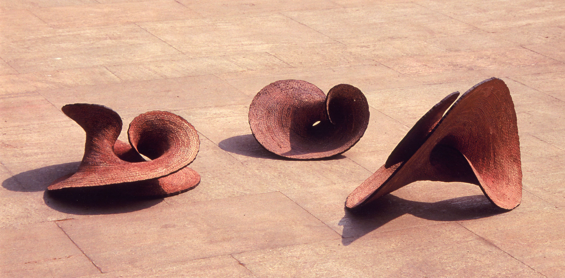 Mixed Media Plastik